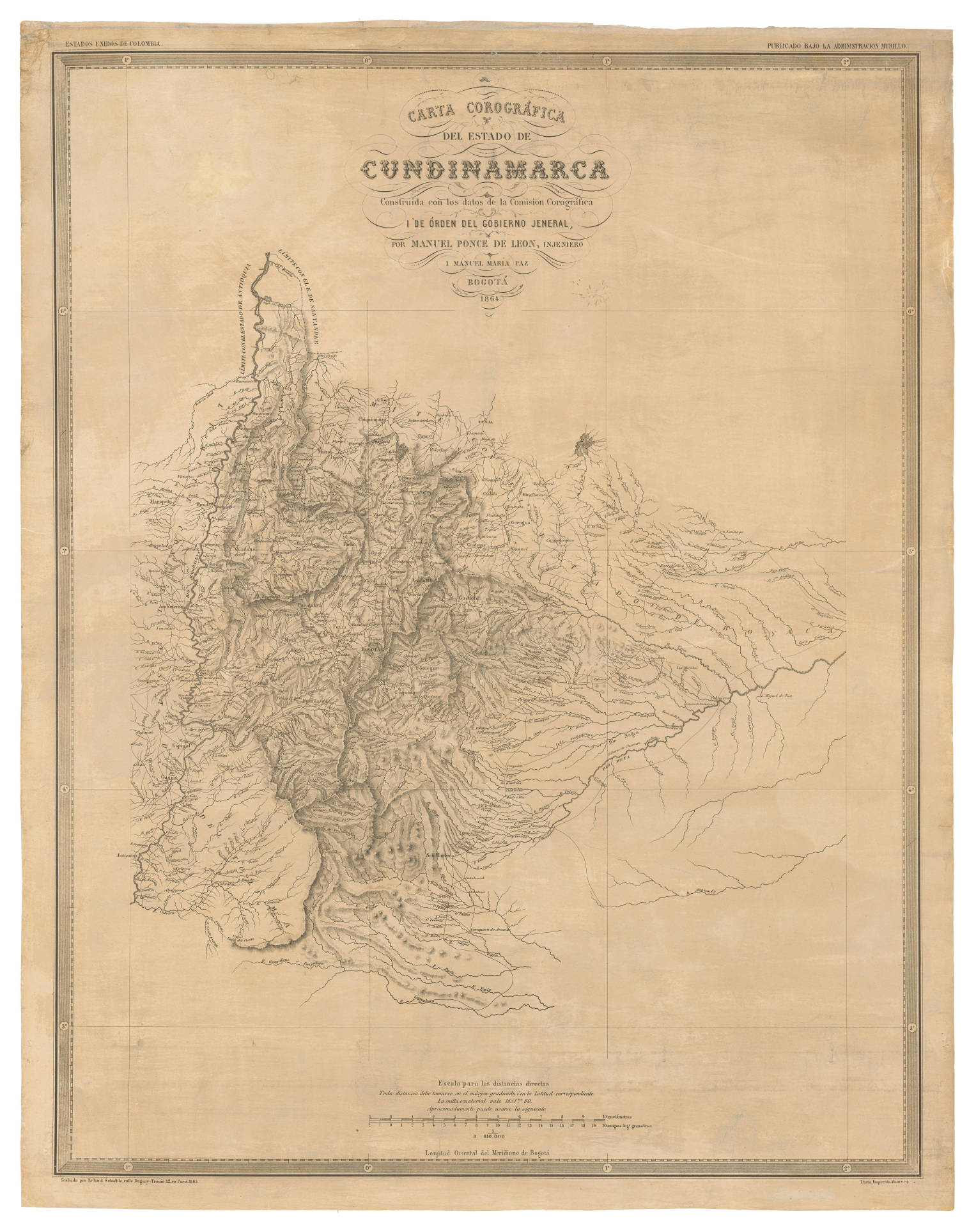 Carta Corográfica del Estado Soberano de Cundinamarca. Tomado del "Atlas de los Estados Unidos de Colombia, antigua Nueva Granada", 1865.